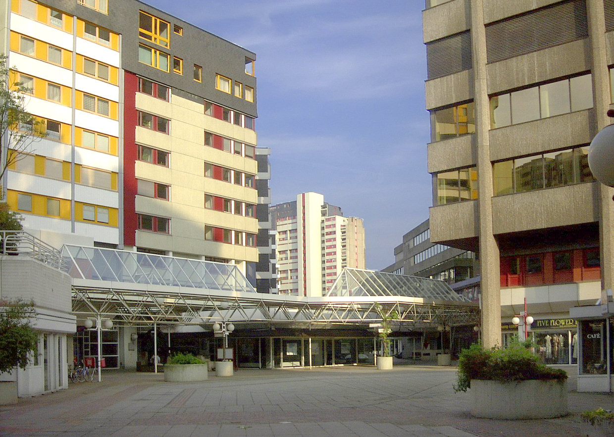 Einkaufspassage im Ihme-Zentrum Hannover, Blick vom Ihmeplatz Richtung Süden